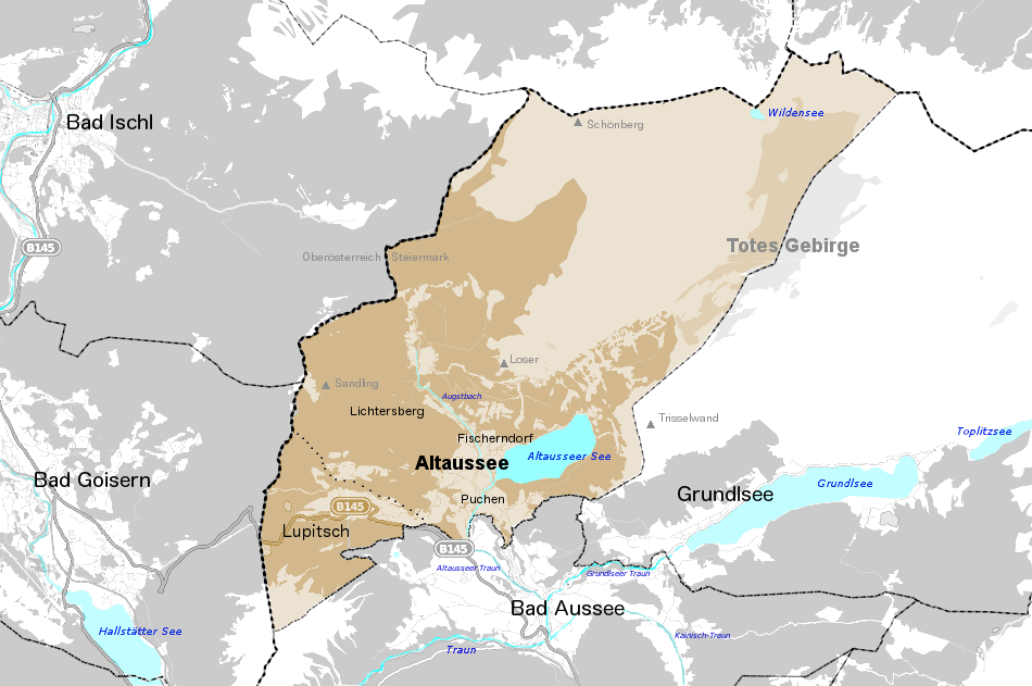 Lage der Ortschaften in der Gemeinde Altaussee unter Nutzung der Karte von OpenStreetMap, Colorierung vorgenommen und ungefähre Lage sowie Bezeichnung der Ortschaften, der umliegenden Berge und Gewässer eingefügt.